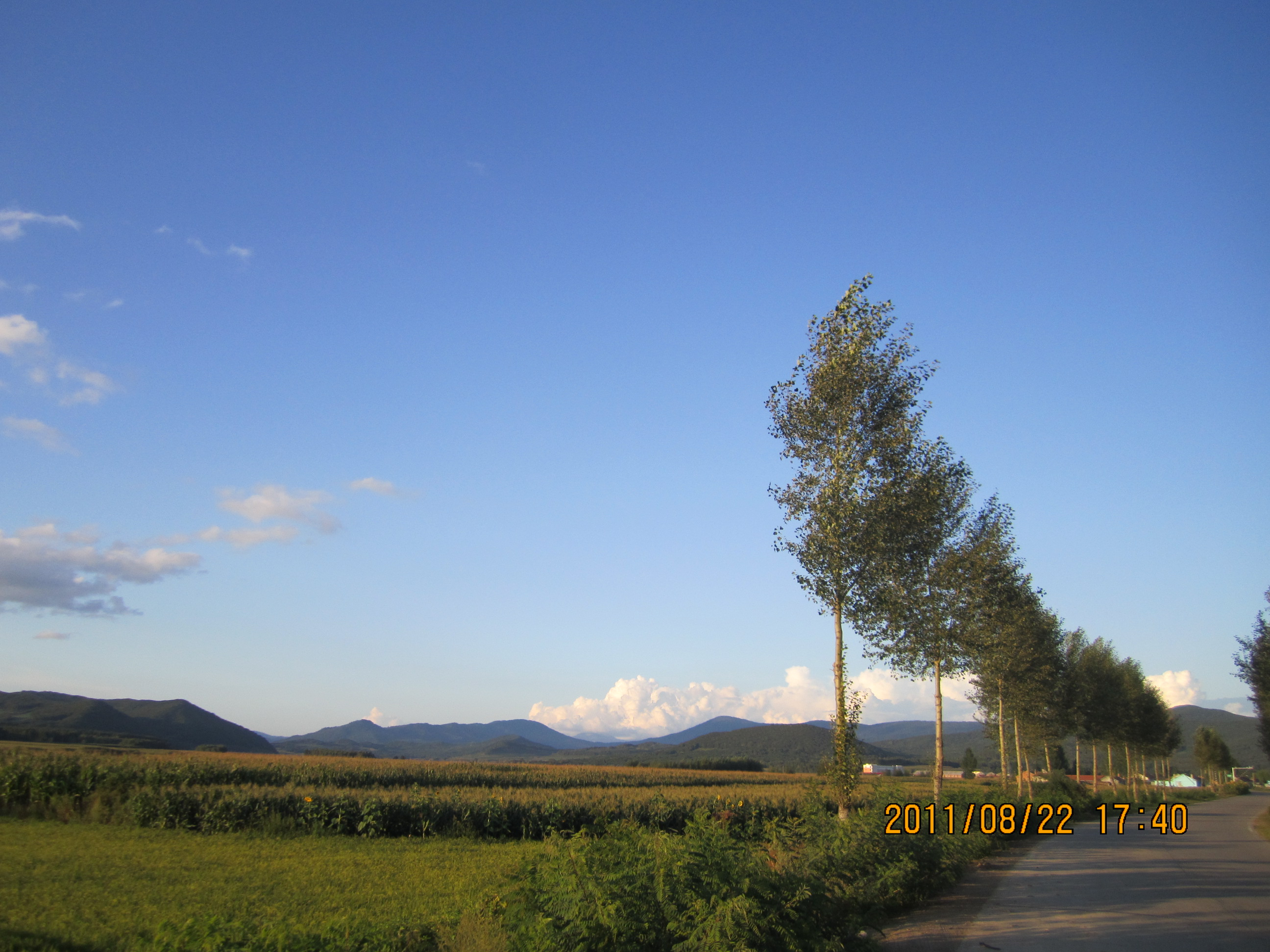 蓝天 白云 稻田 远山 再往前走就是前进村了